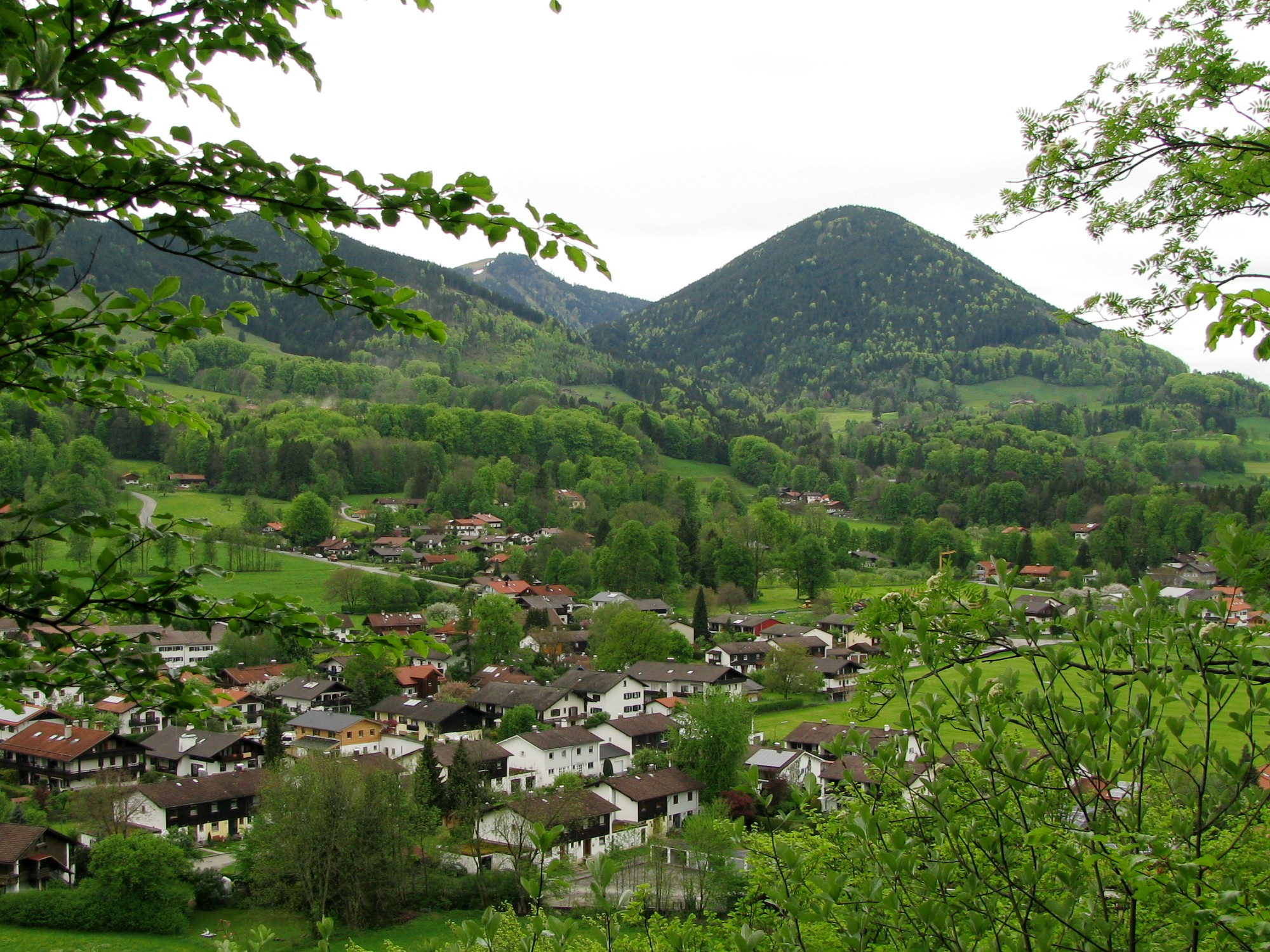 Brannenburger Ortsteil Milbing, dahinter der Sulzberg; Blick vom Westhang der Biber.